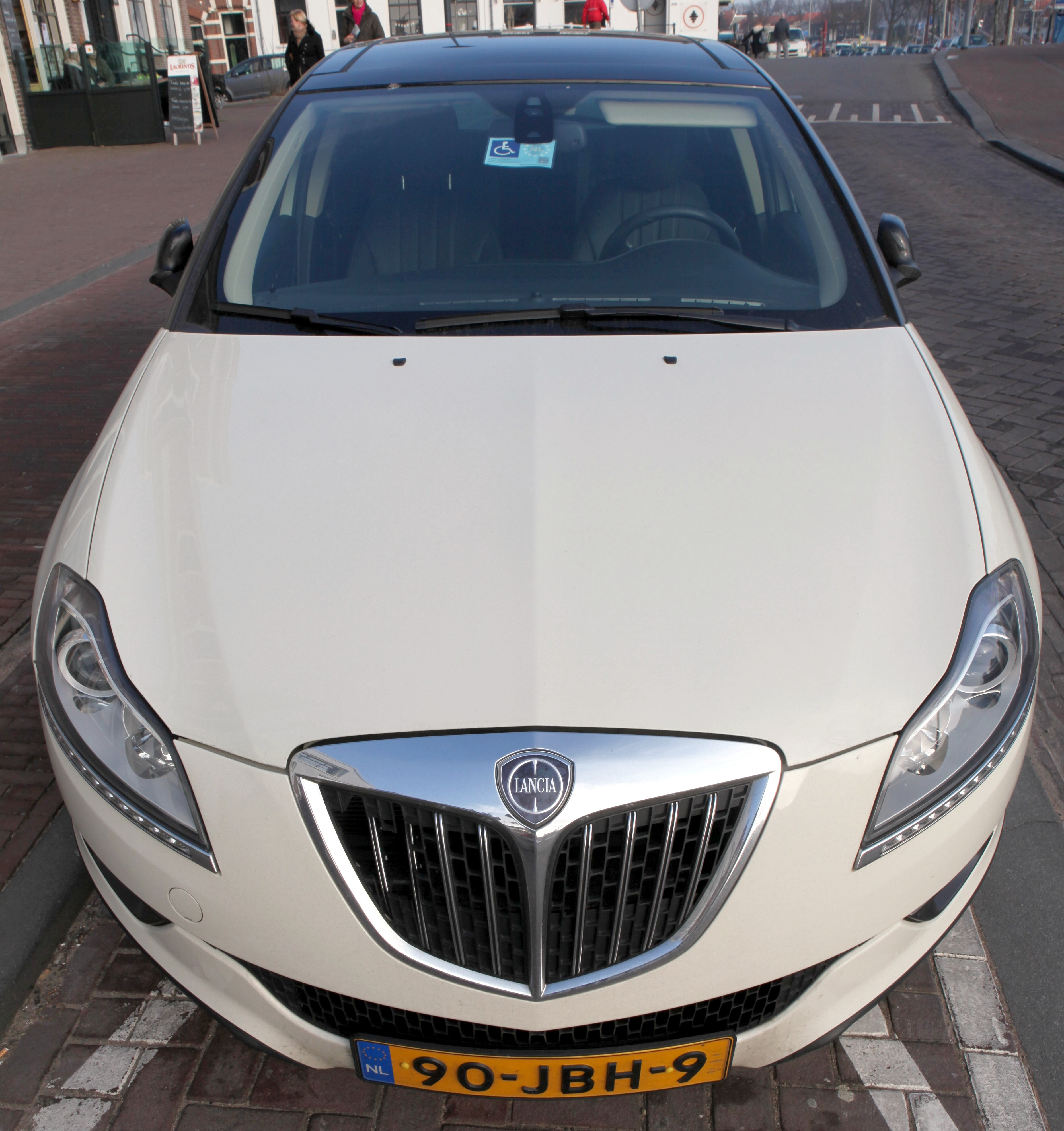 Lancia Delta